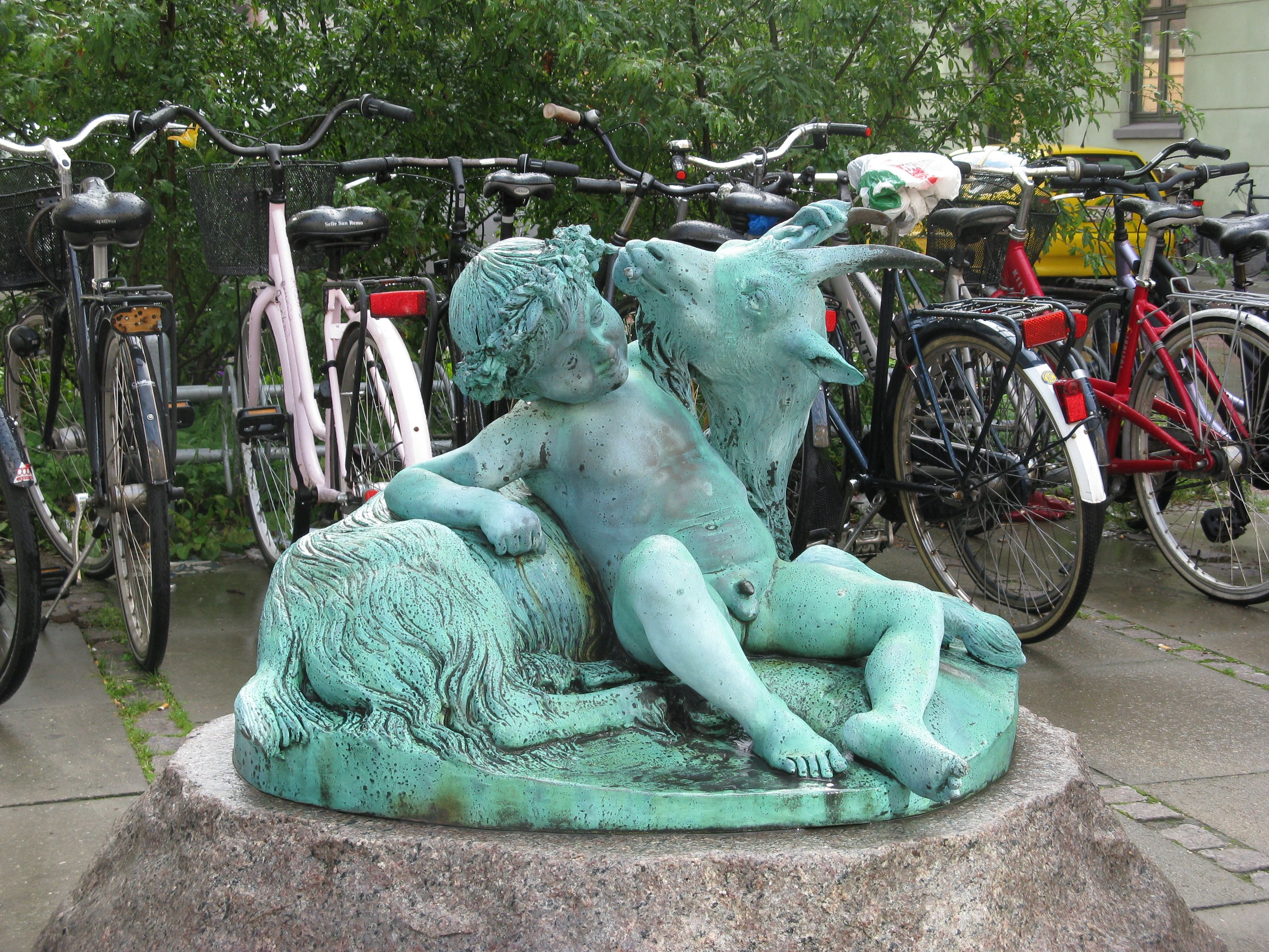 Dreng med ged by Otto Evens at Corner of Tranevej and Frederikssundsvej in Copenhagen.